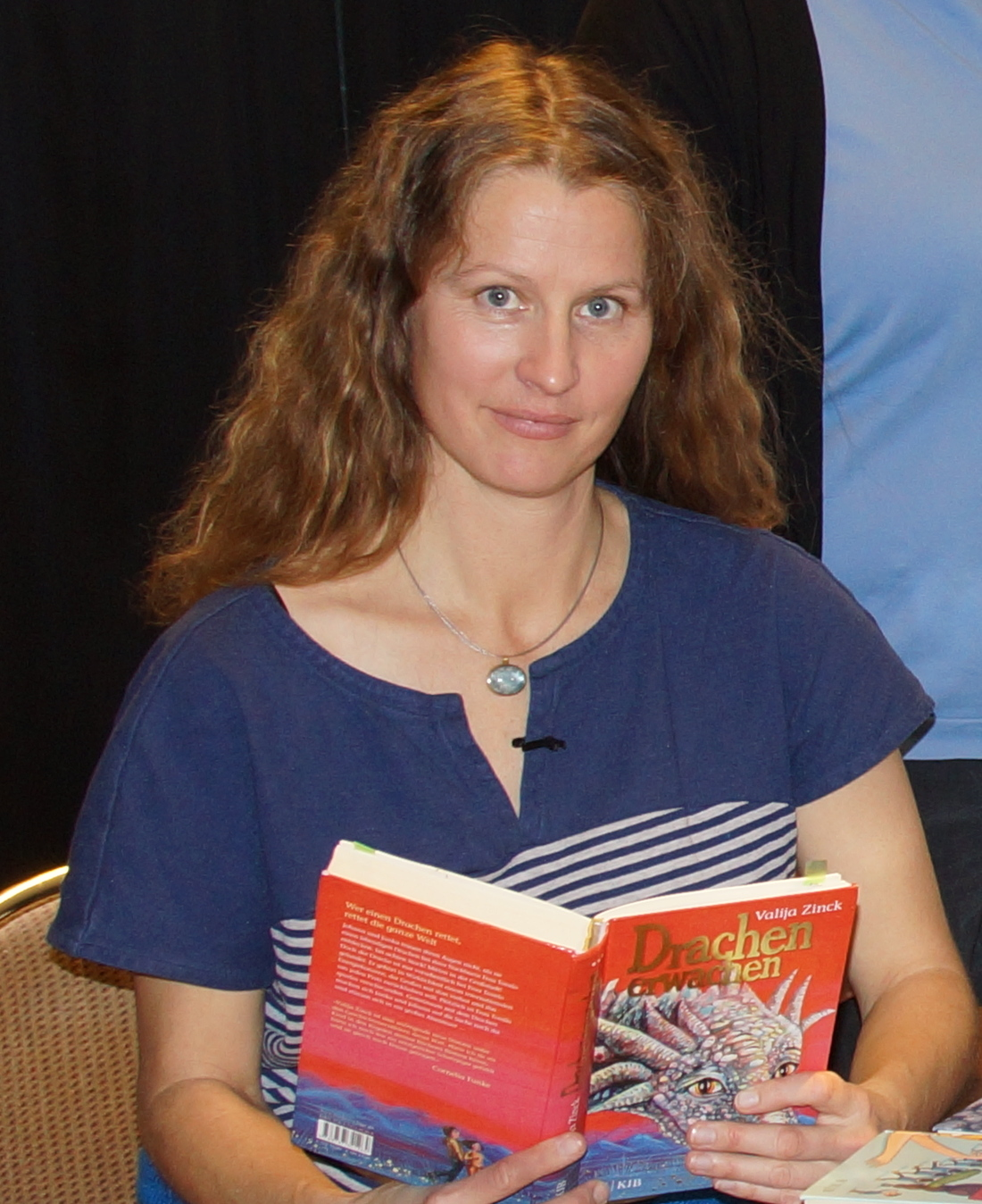 Valija Zinck, Lesung